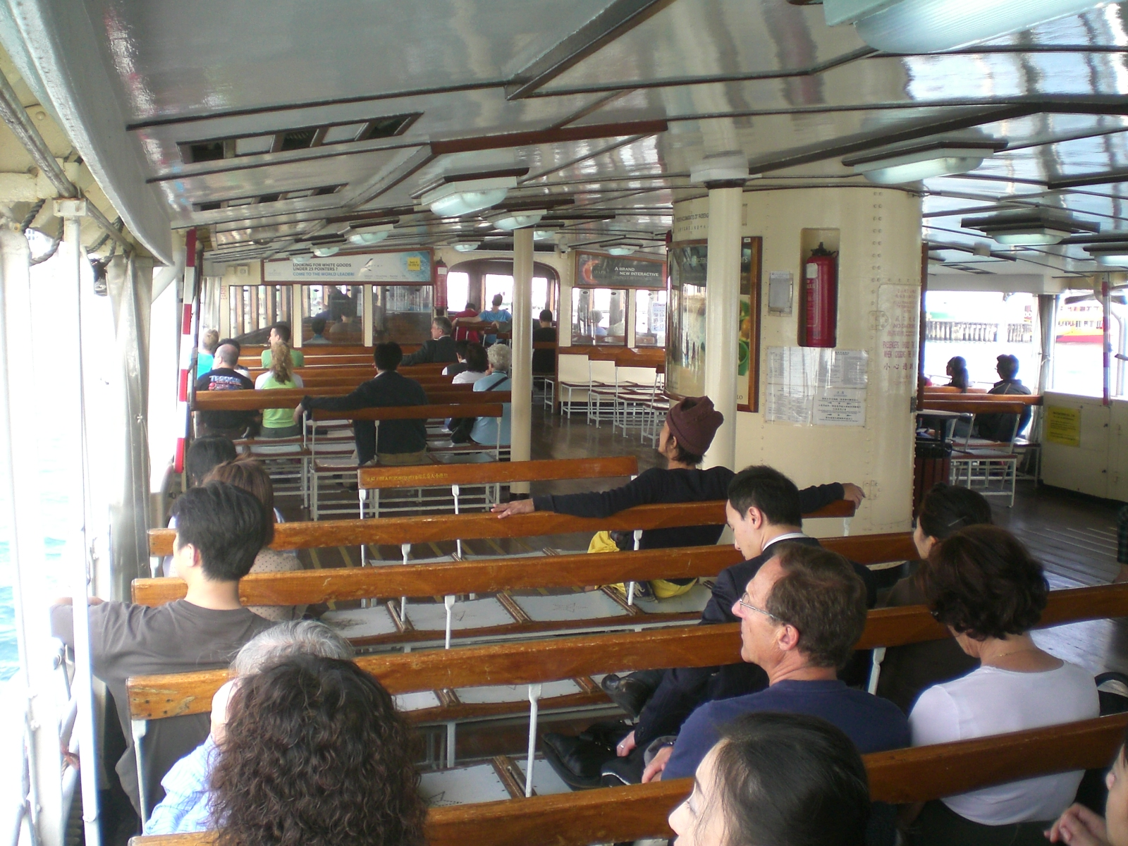 天星小輪上層客位